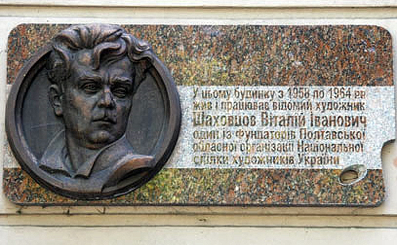 Шаховцов Виталий Иванович, мемориальная доска. Полтава.